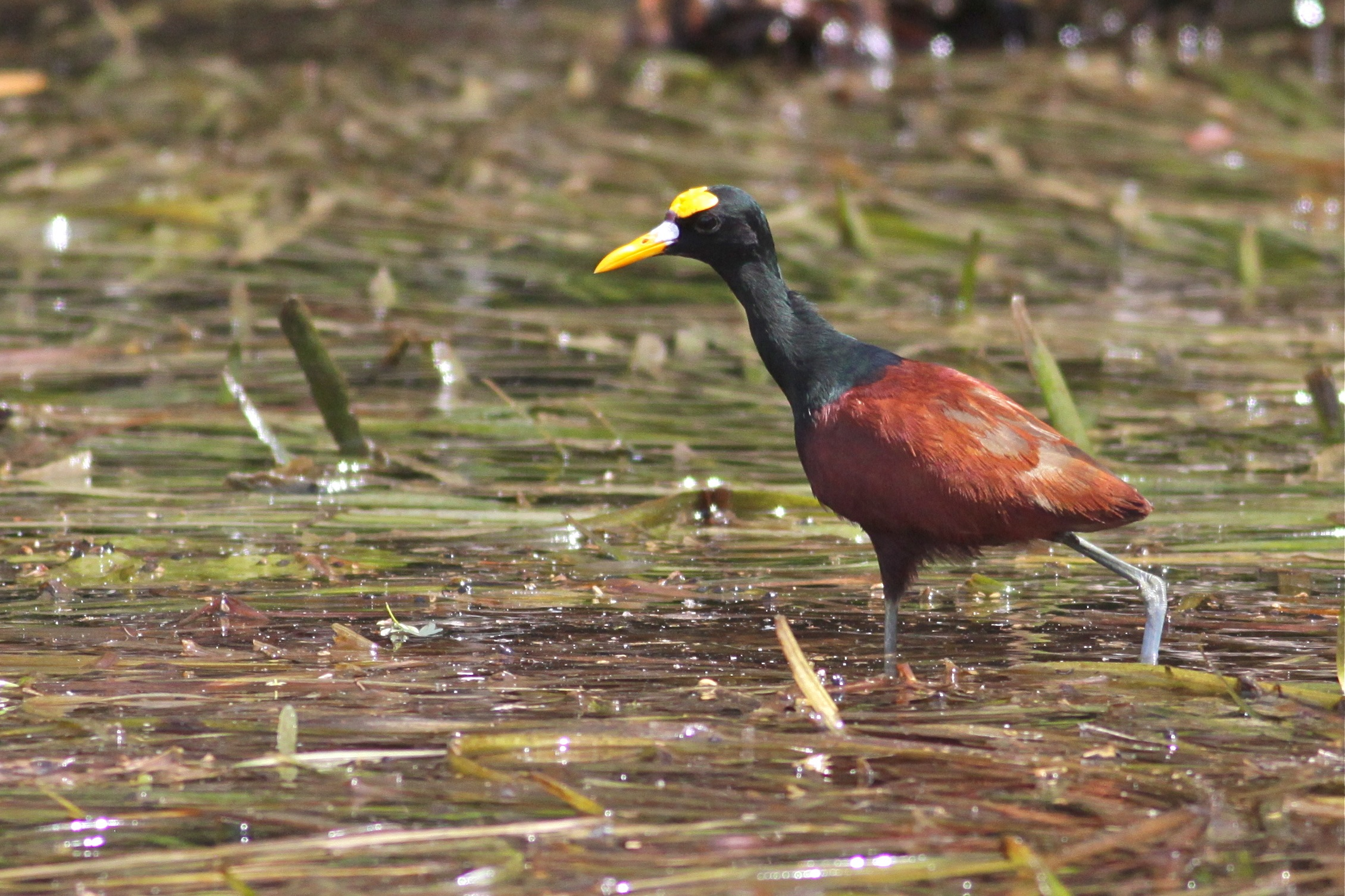 New River, Belize.